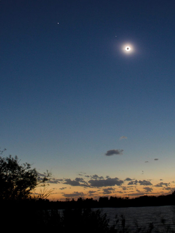 Полное солнечное затмение 1 августа 2008 года п. Коченево (Новосибирская область)